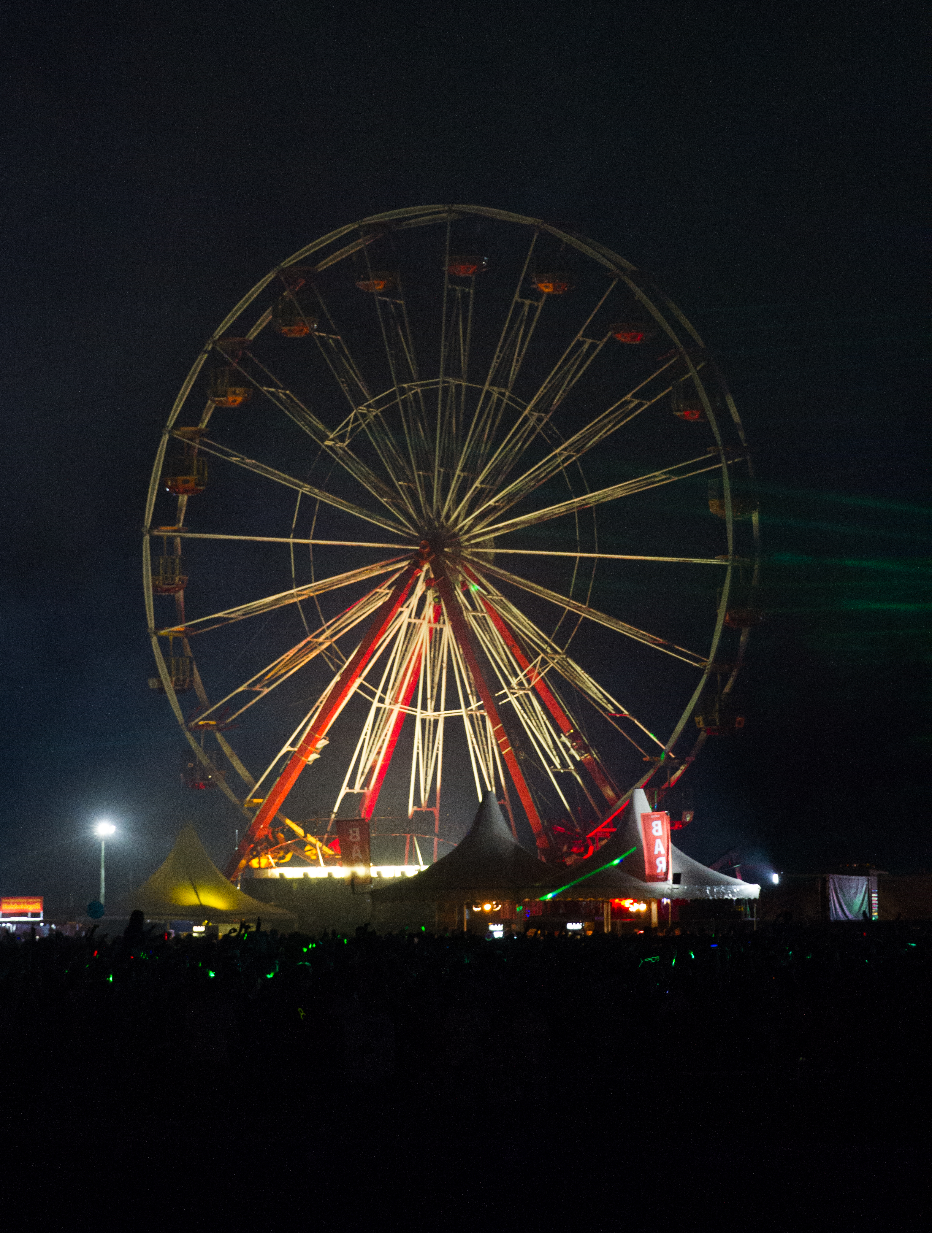 Riesenrad beim 14. Airbeat-One Dance Festivals das vom 16. bis 19. Juli 2015 auf dem Flugplatz Neustadt-Glewe stattfand.